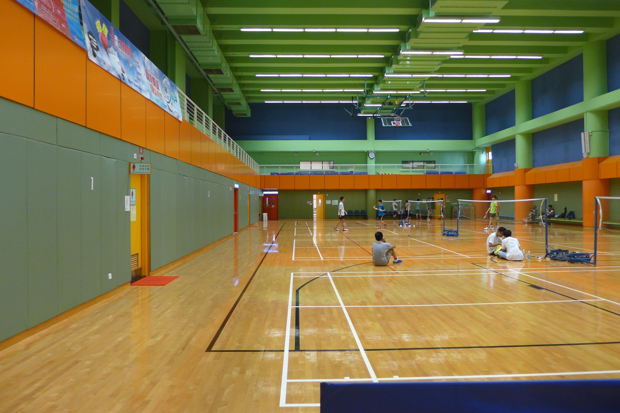 Aberdeen Sports Centre Level 6 Arena